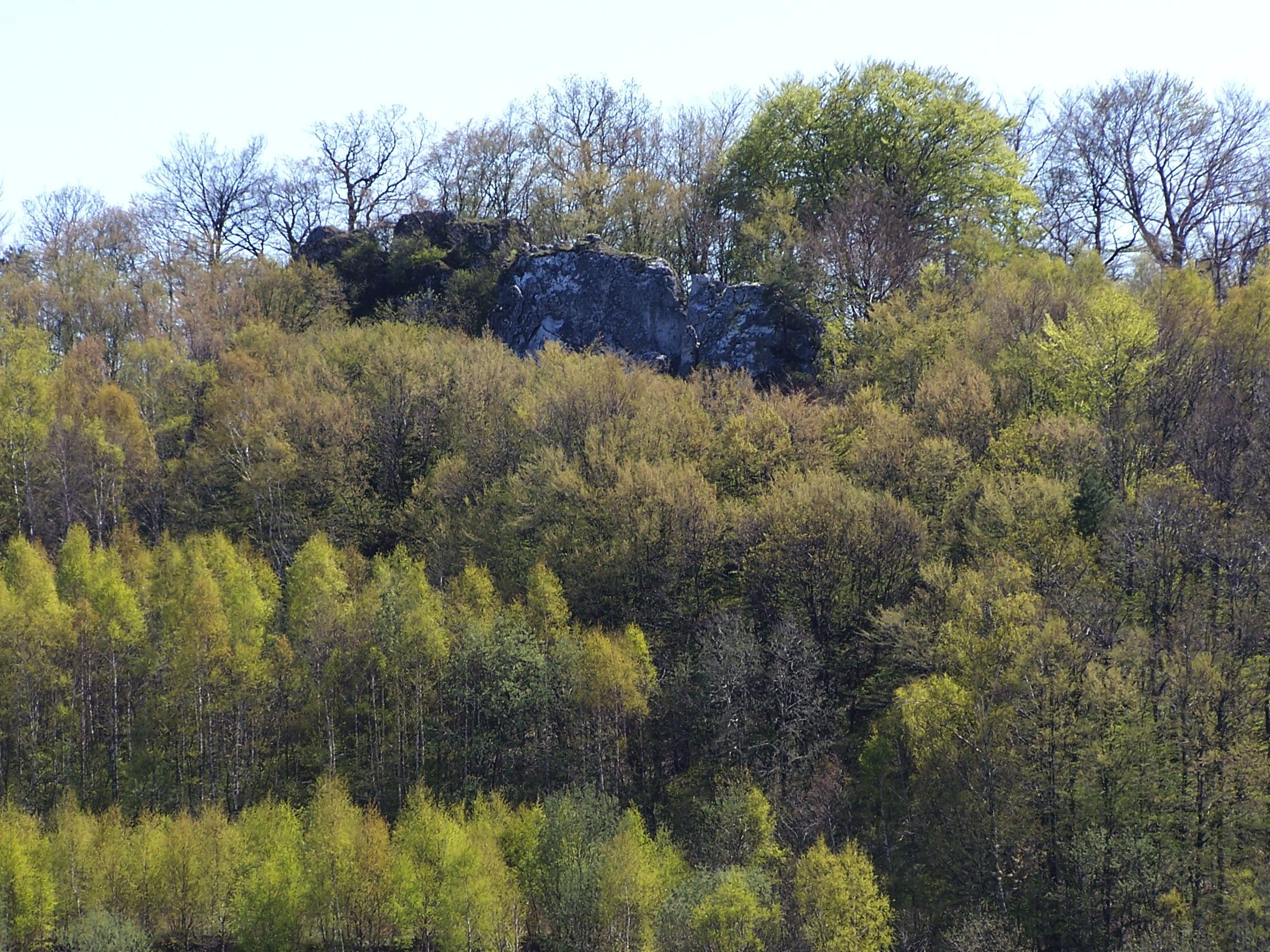 dolina Kobylańska (Borynia)